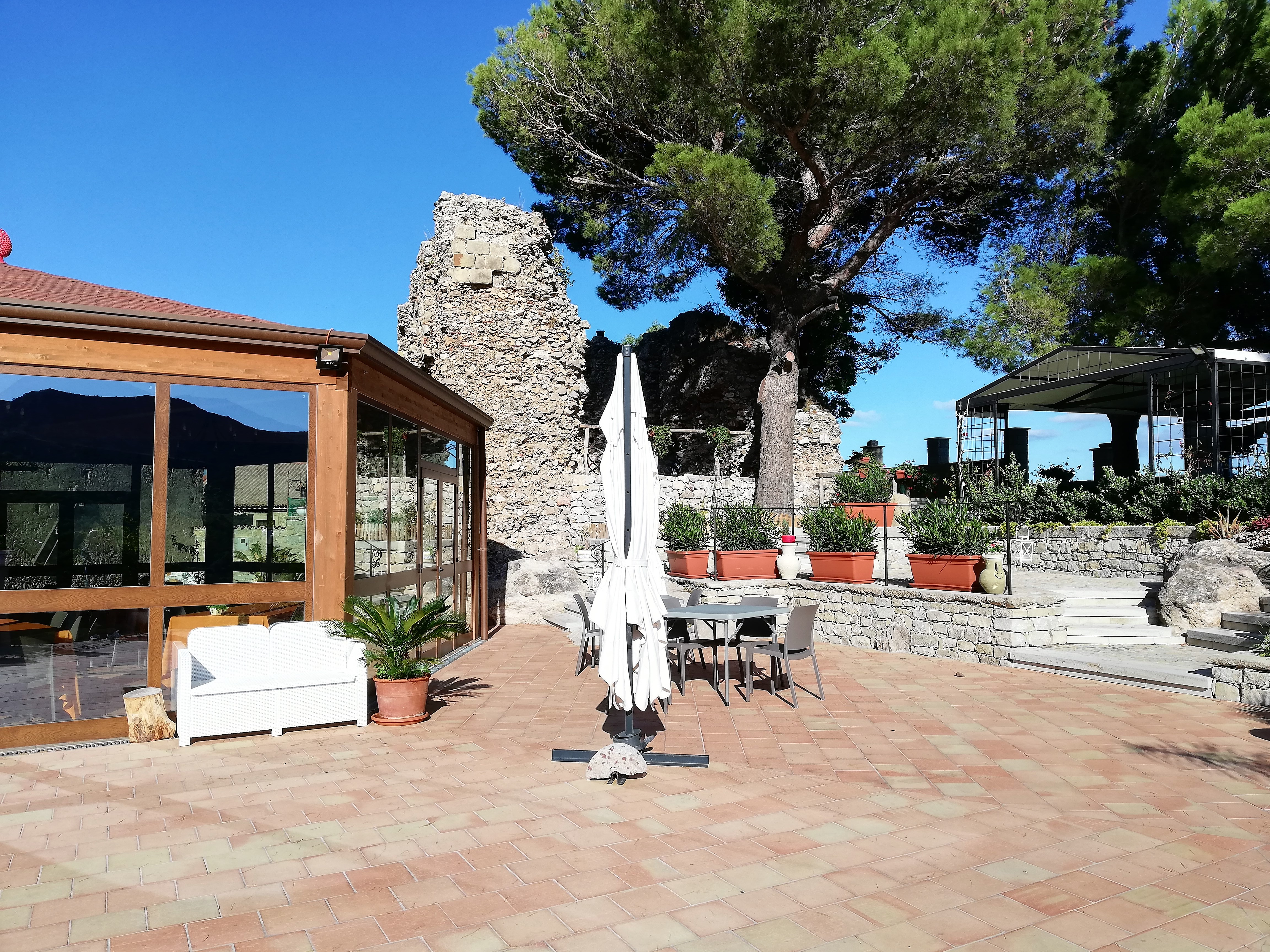 Corte.